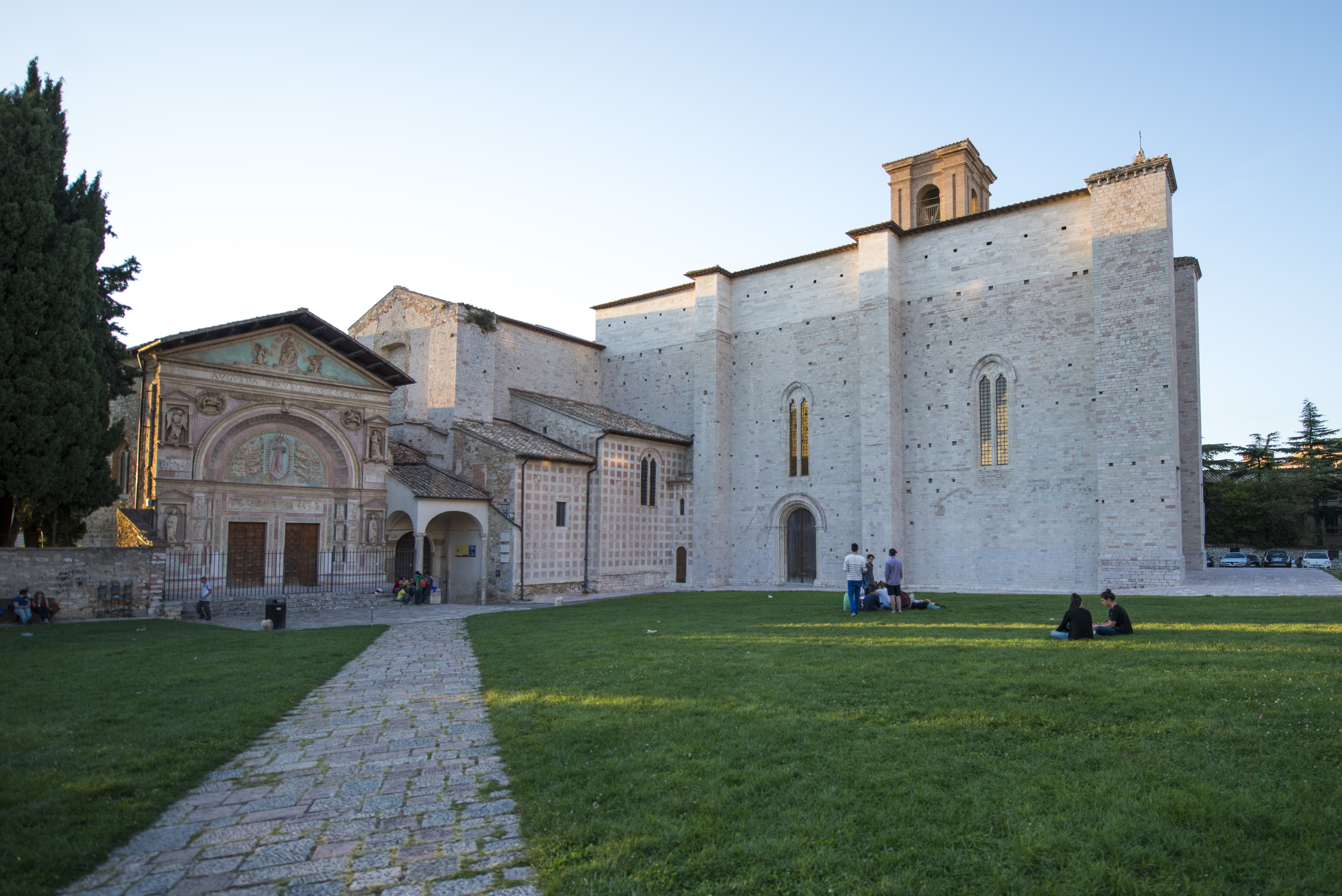 Complesso di San Francesco al Prato This is a photo of a monument which is part of cultural heritage of Italy.